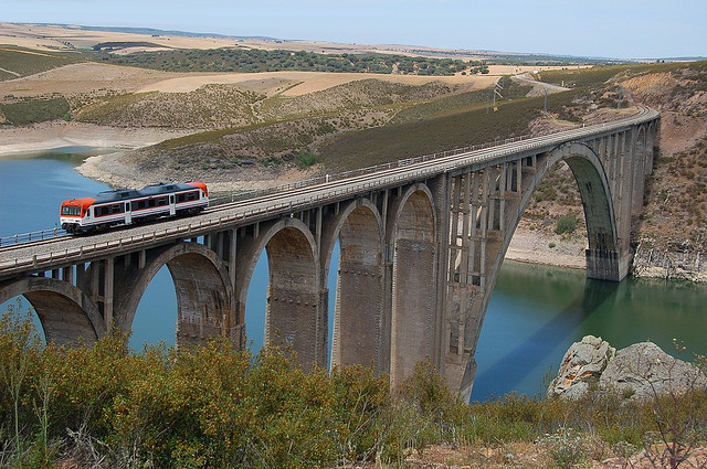 El Viaducto Martín Gil es uno de los viaductos situados sobre el río Esla en el paraje conocido como "Los Cabriles", siendo éste ya parte del embalse de Ricobayo, entre los pueblos de Palacios del Pan y Manzanal del Barco (Zamora)